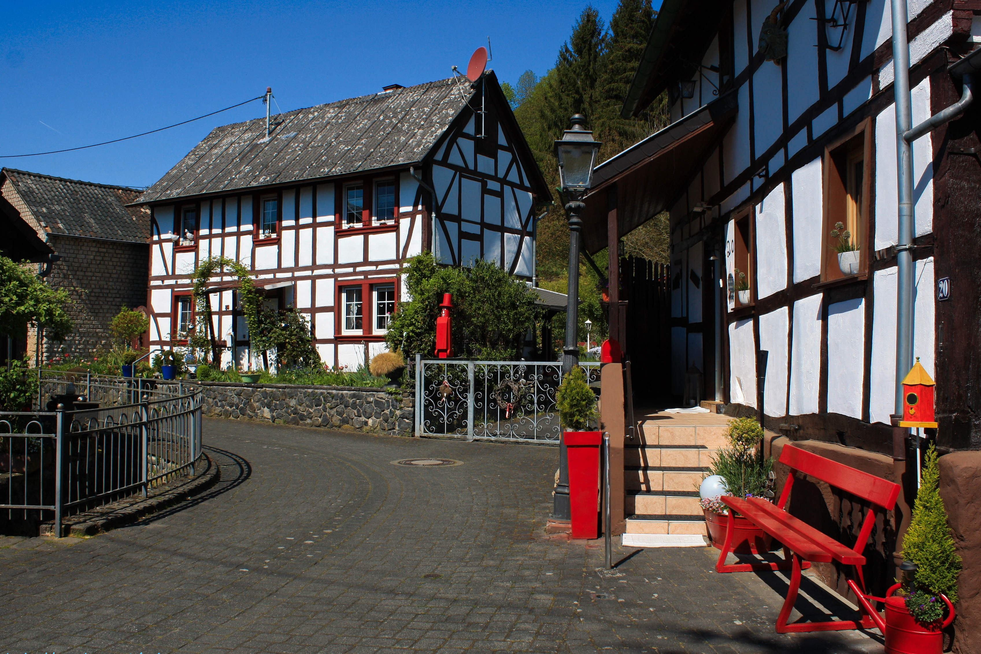 Unkelbach